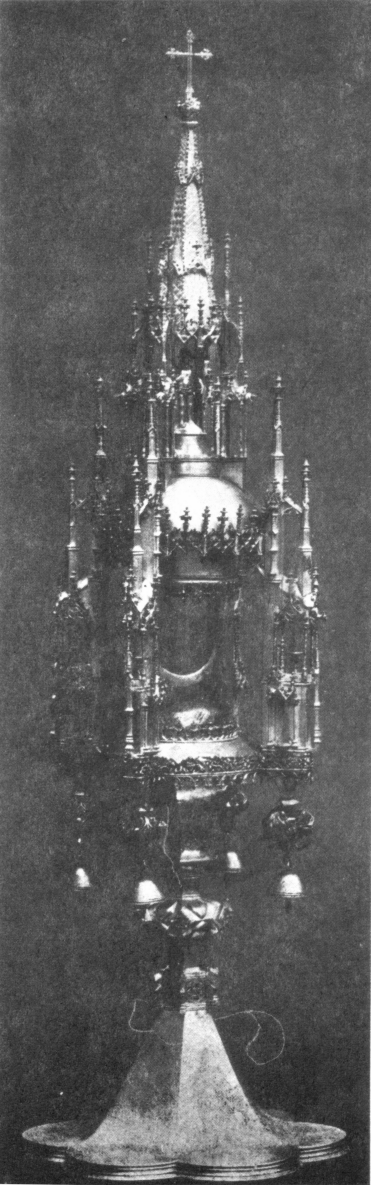 Monstranz von um 1500 der St.-Peter-Kirche, Waltrop, 1879